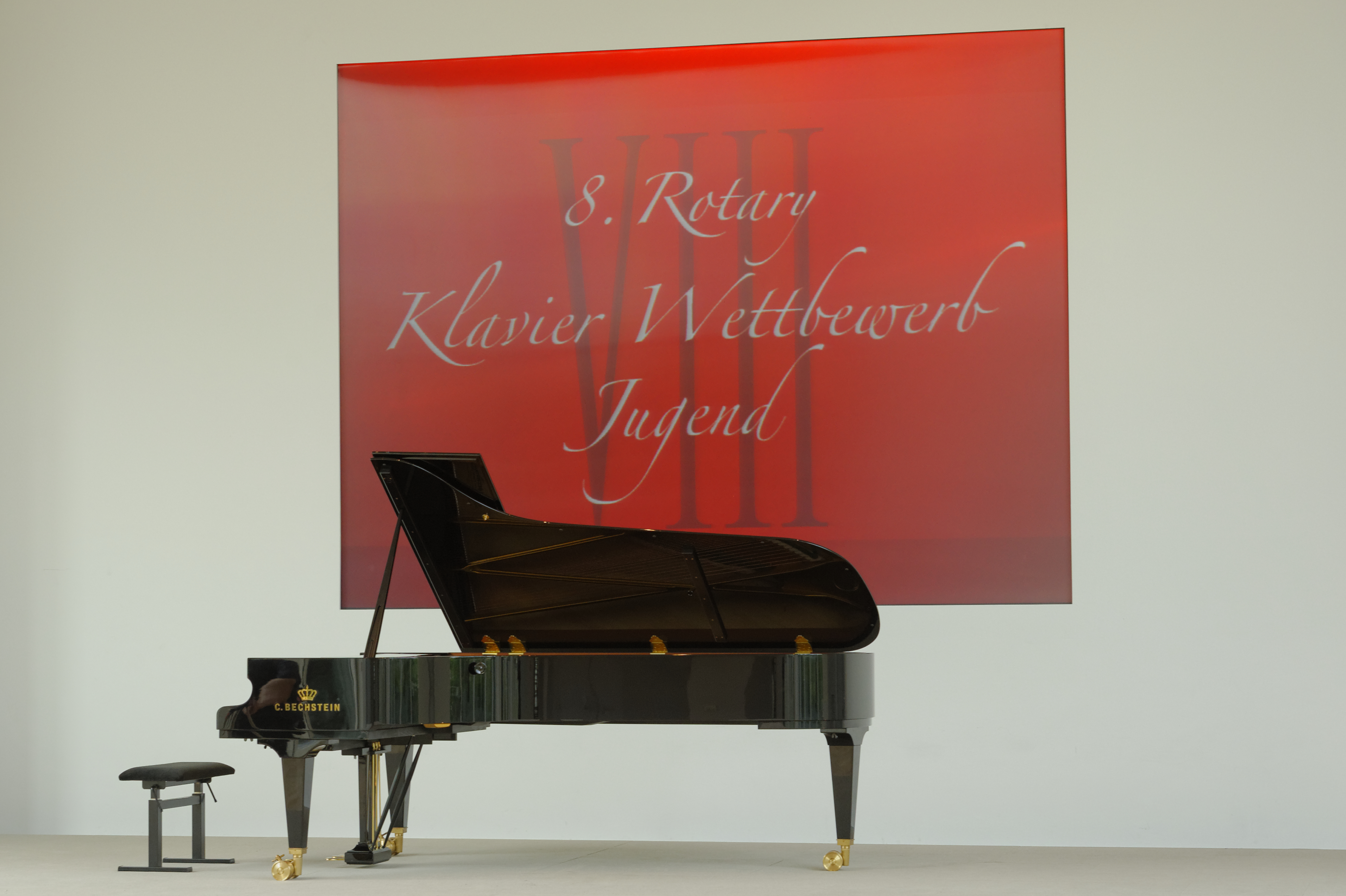 Rotary Klavierwettbewerb 2013